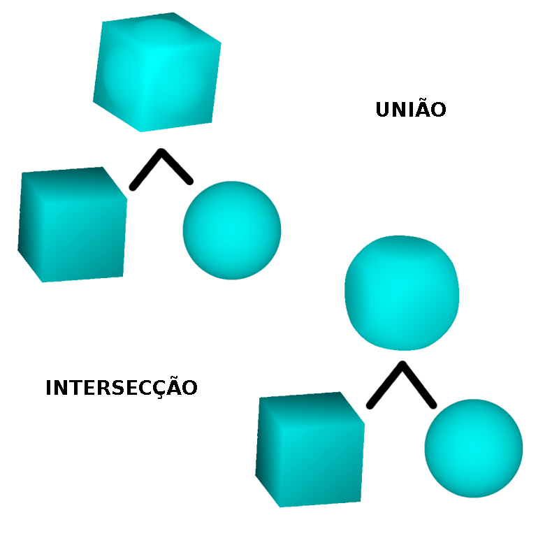 Árvore CSG